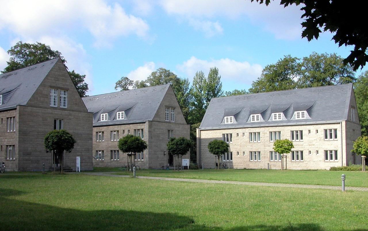 Braunschweig: „Akademie für Jugendführung“, Wohngebäude. Brunswick, Germany: “Akademie für Jugendführung”, living quarters.